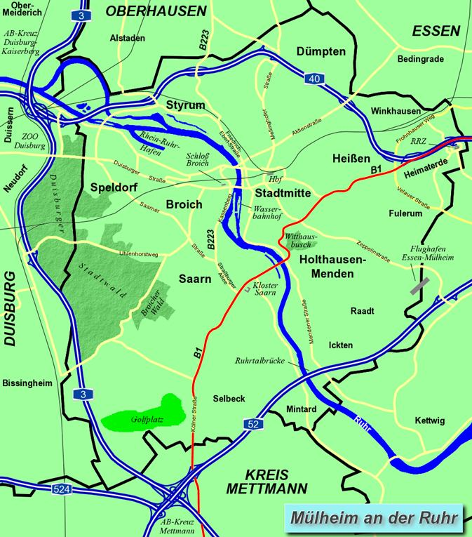 Beschreibung: Mülheim an der Ruhr: Übersichtsplan mit B1 Zeichner: Benutzer:W.wolny, ergänzt von Benutzer:Ruesterstaude Quelle: 2005-04-18 19:04:33 . . W.wolny (Diskussion) . . 1000 x 1146 (502857 Byte) (kl. korr.) 2005-04-06 14:32:06 . . W.wolny (Diskussion) . . 1000 x 1146 (503414 Byte) (weiter verbesserte Version) 2005-04-05 14:26:35 . . W.wolny (Diskussion) . . 1000 x 1146 (435667 Byte) (verfeinerte Version) 2005-04-03 15:11:30 . . W.wolny (Diskussion) . . 1000 x 1146 (417331 Byte) (Ruhr benannt) 2005-04-03 14:35:44 . . W.wolny (Diskussion) . . 1000 x 1146 (416090 Byte) Lizenz